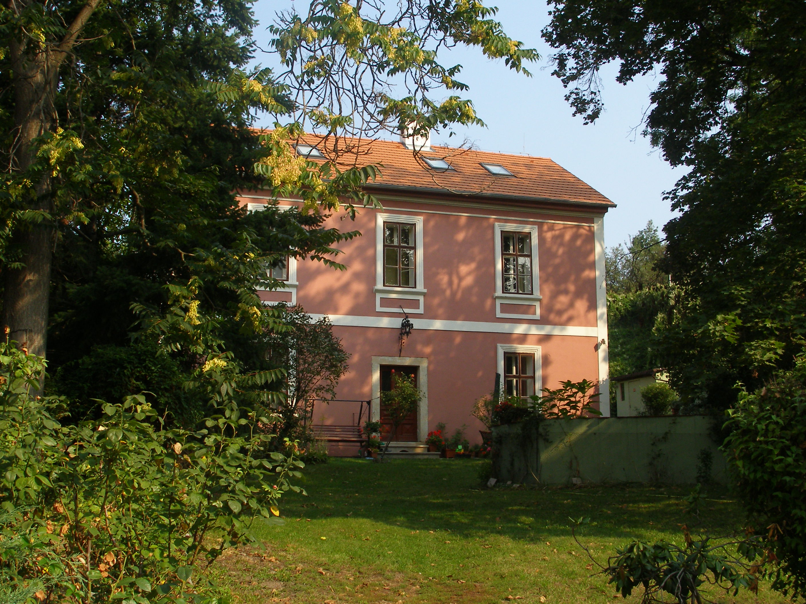 Rodinný dům S. K. Neumanna (Žižkov), Praha 3, Chelčického 45/41, Žižkov